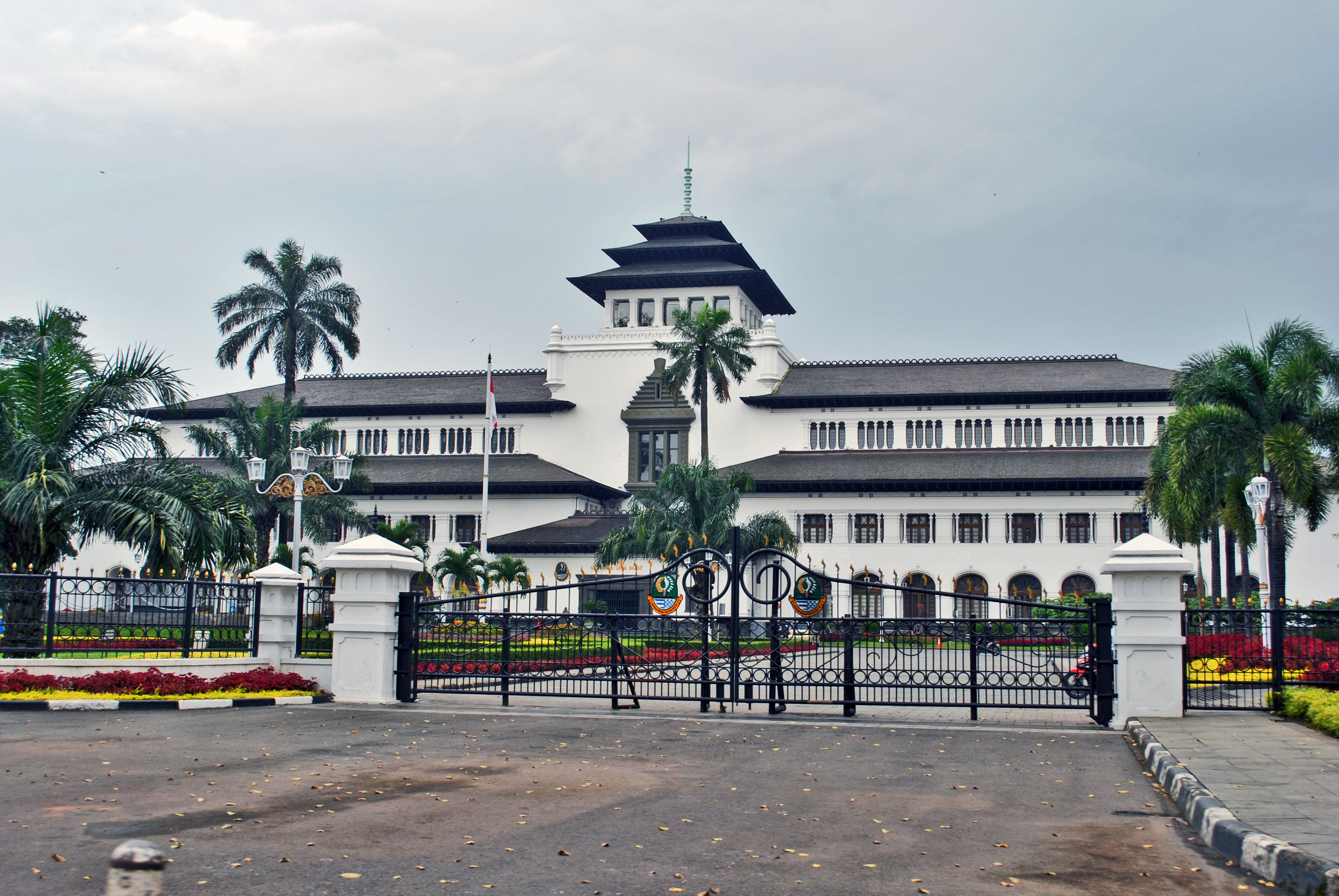 Gedung Sate